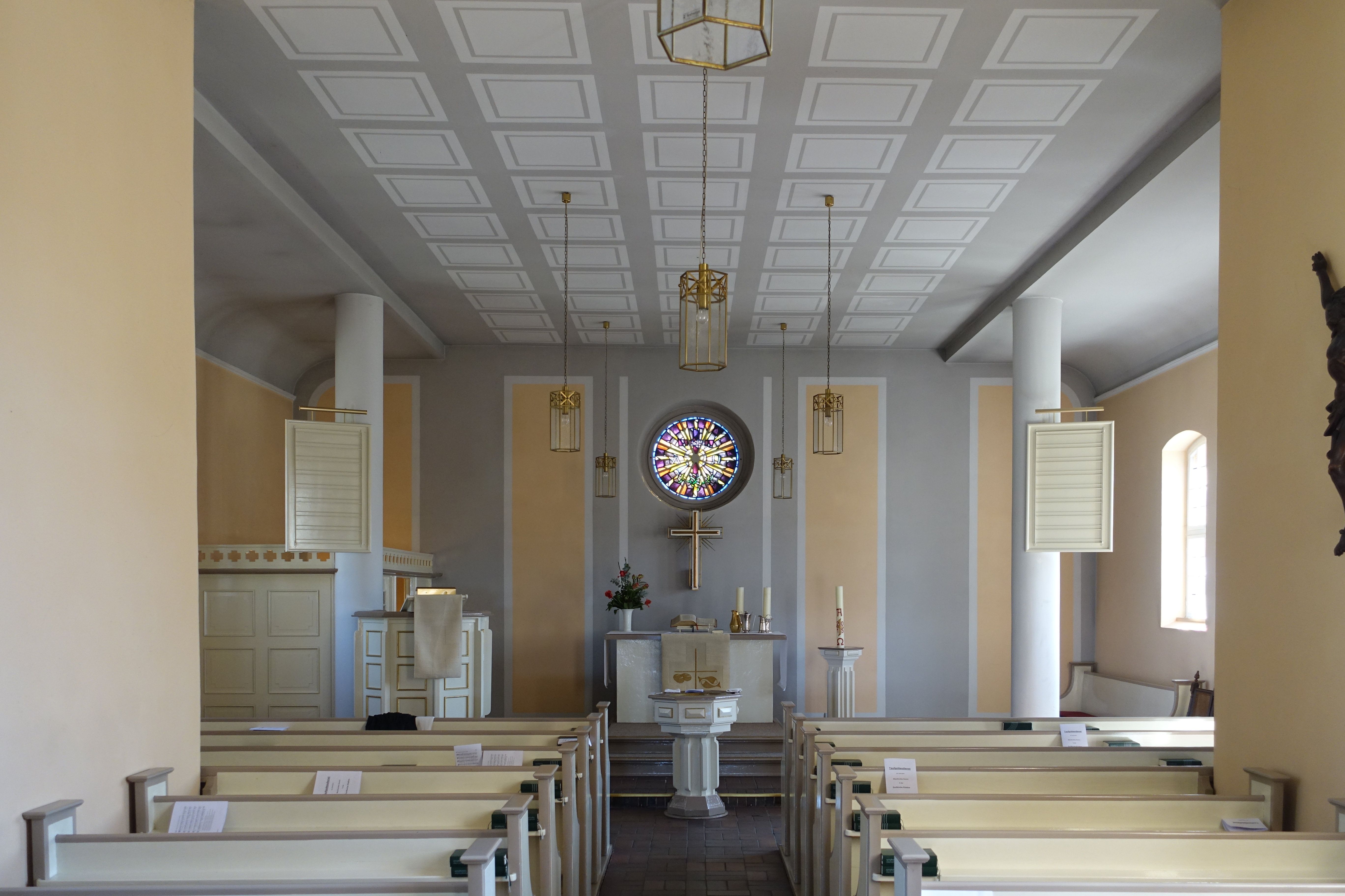 Kirchraum mit Blick auf den Altar